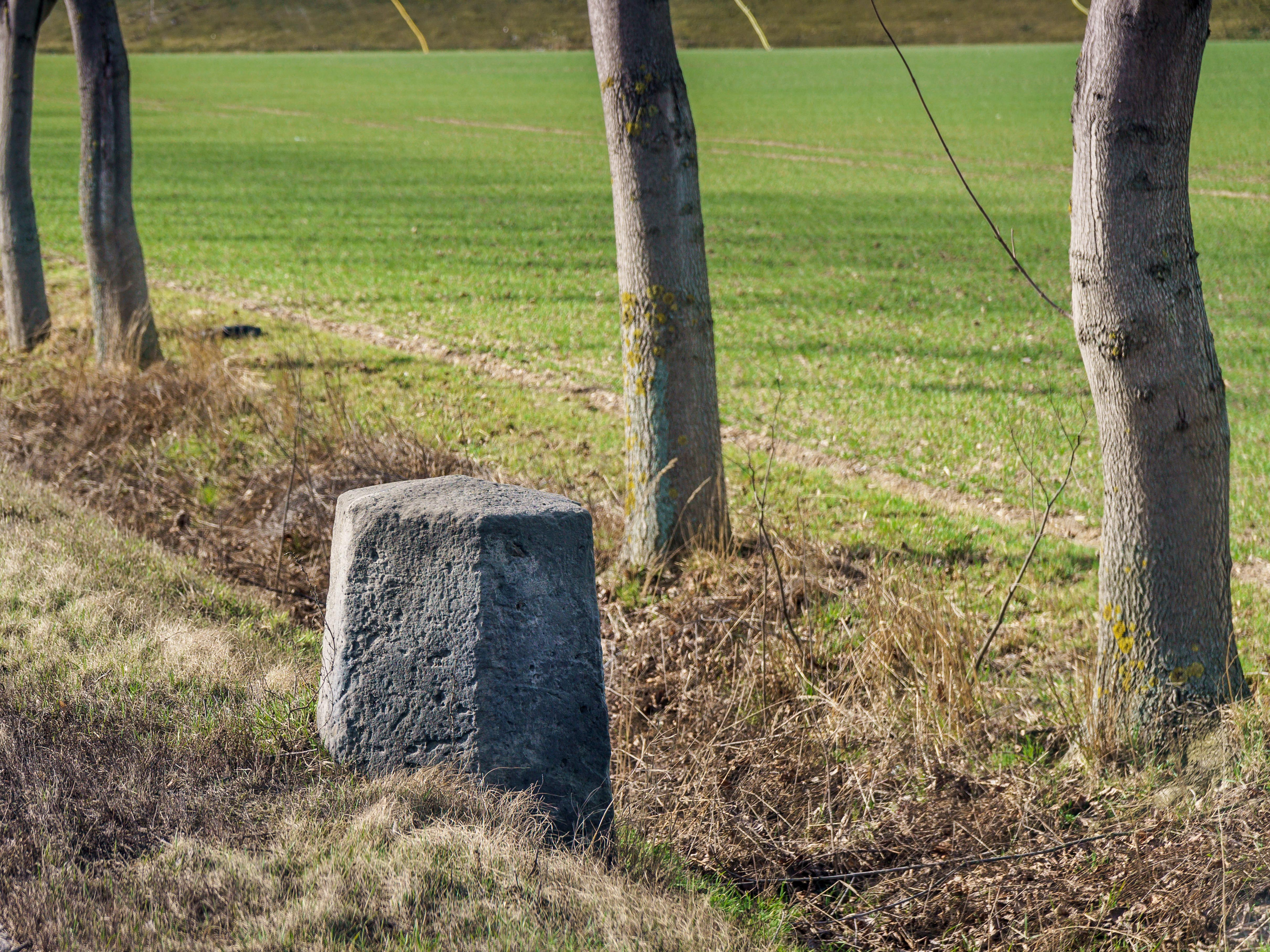 Preußischer Meilenstein (0793), B 100, nordwestliche Straßenseite, ca. 300 m nordöstlich von L 143 in Landsberg (Saalekreis). Inschrift: 2 Ml